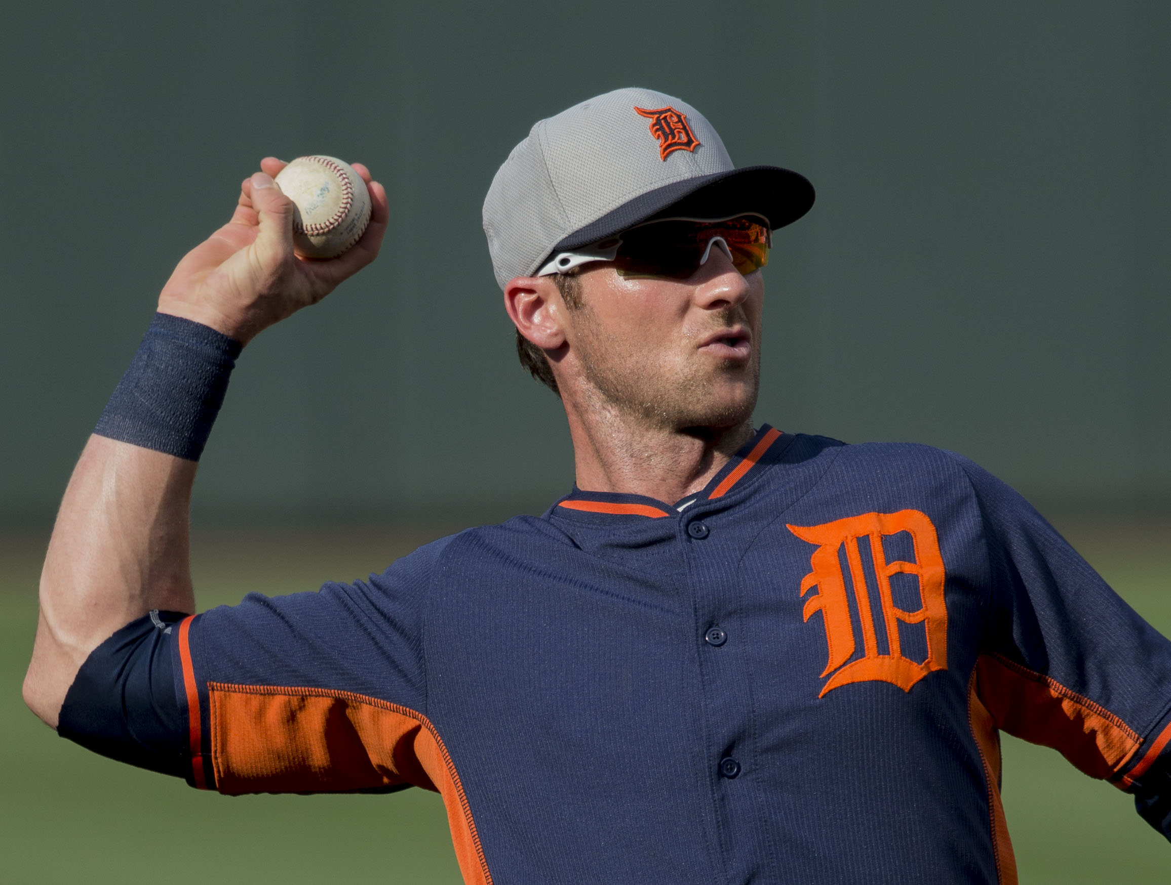 Tigers at Orioles 8/1/15